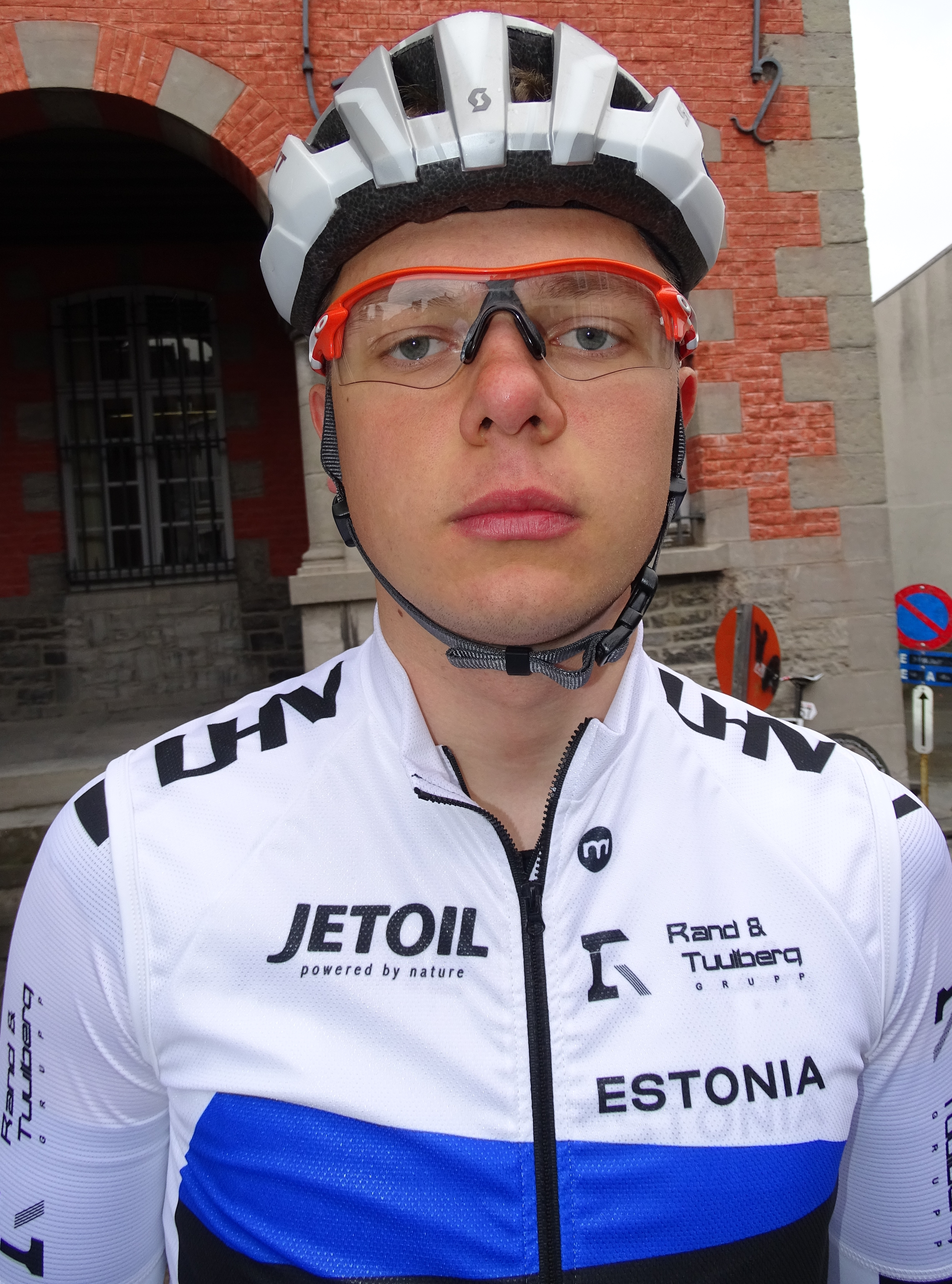 Triptyque des Monts et Châteaux 2015 Depicted person: Timmo Jeret Depicted team: Équipe nationale d'Estonie espoirs